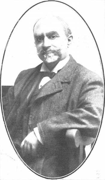 El notable africanista y distinguido literato D. Felipe Óvilo. Obra del fotógrafo Kaulak.